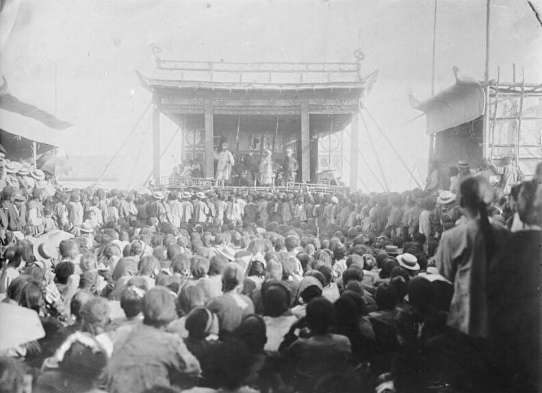 China, Tsingtau, Chinesische Theatervorstellung China, Tsingtau Chinesische Theatervorstellung für die Belegschaft der Fangtsegrube am 30. Mai 1908.